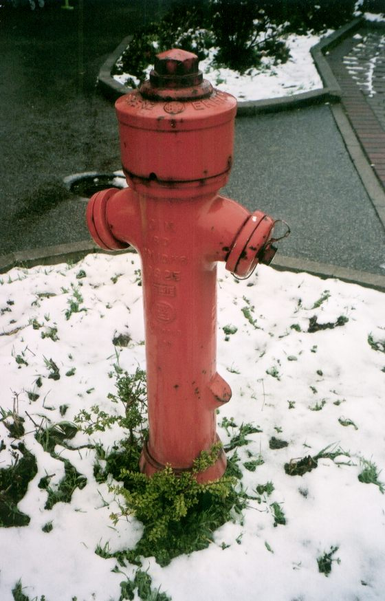 ein Überflurhydrant ohne Fallmantel, in Viernheim